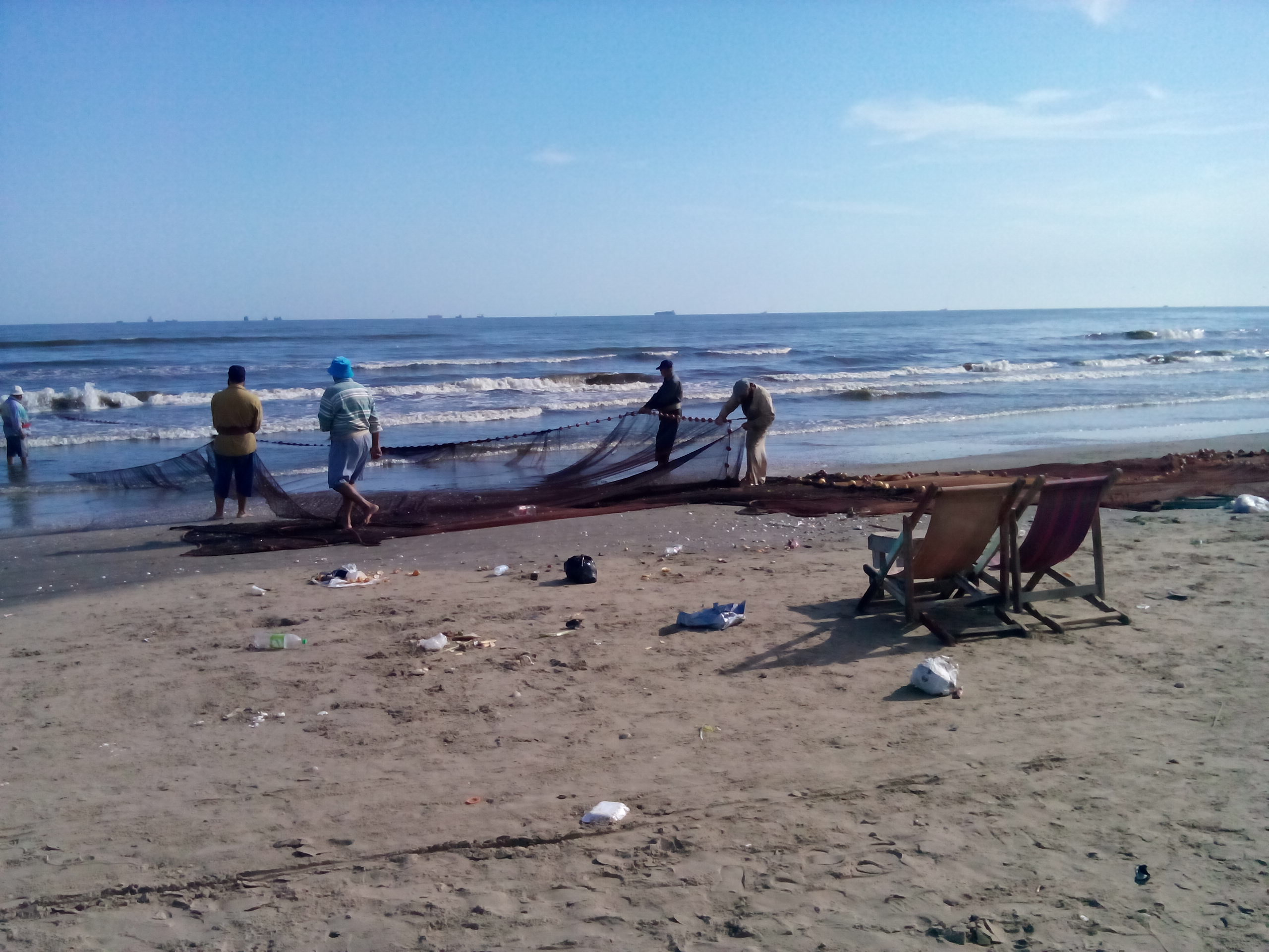 شاطيء بورسعيد أثناء صيد السمك، مصر.